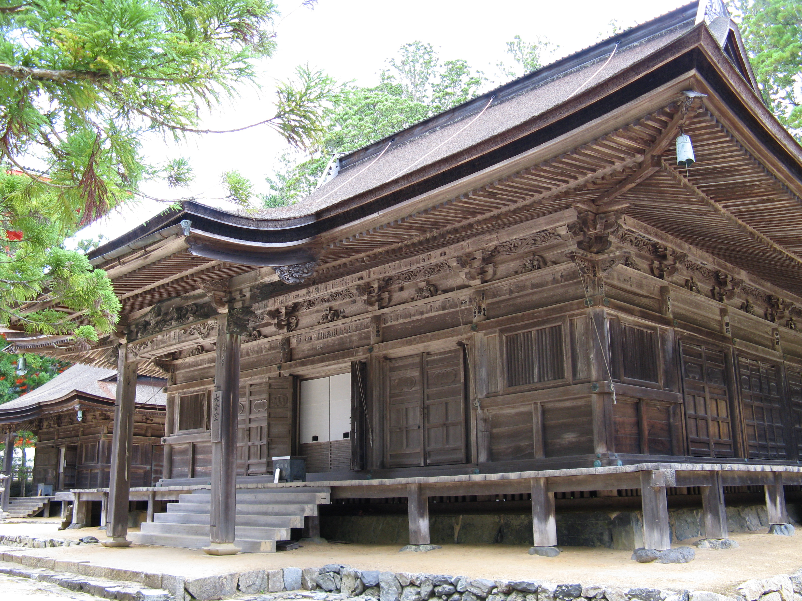 高野山 壇場伽藍 大会堂